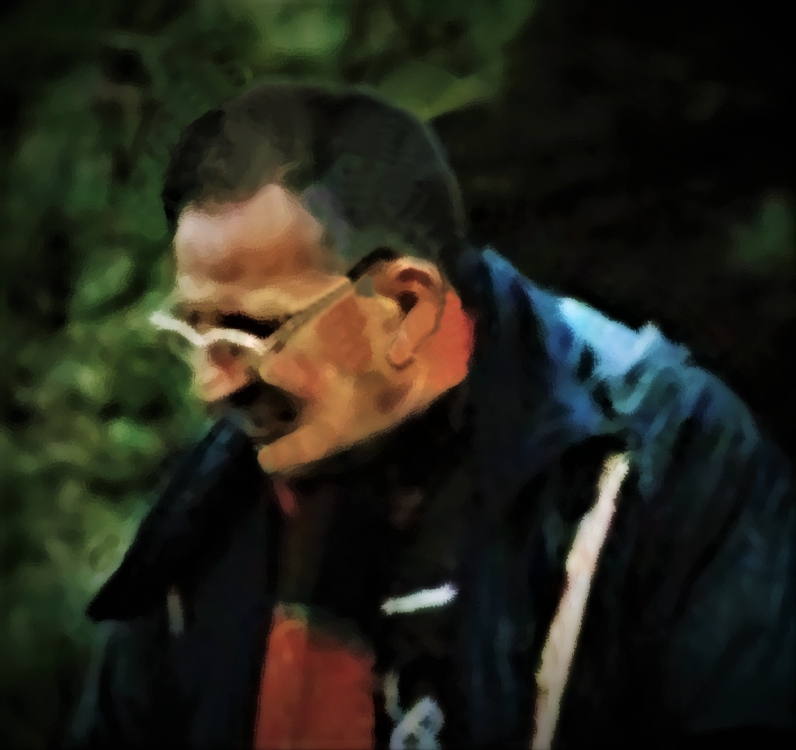 Marcel Bon (1925-2014)